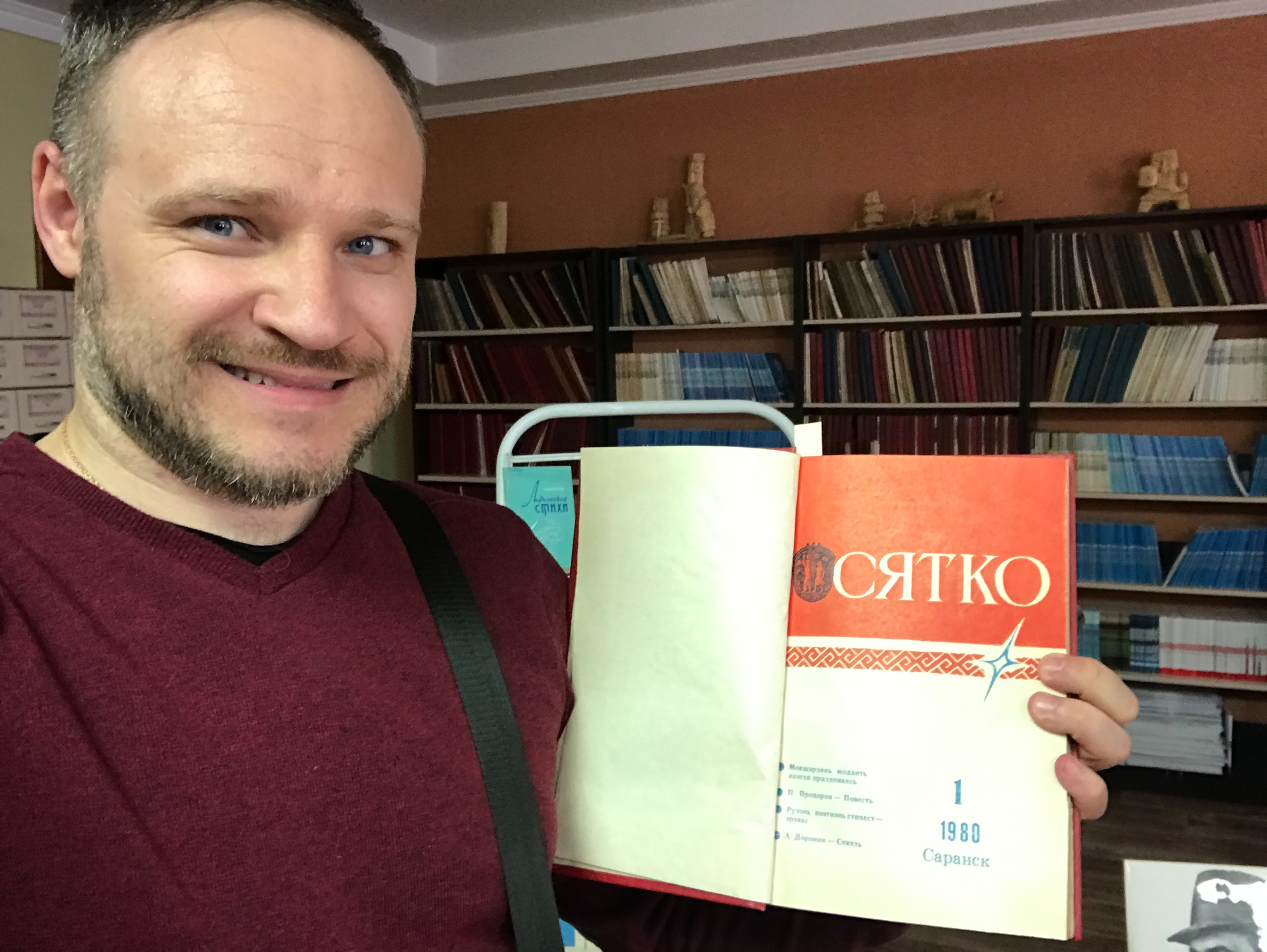 Презентация проекта «Открытое наследие» в Национальной библиотеке имени А. С. Пушкина Республики Мордовия. Андрей Петров с номером журнала «Сятко», ровесником которого является. Отдел национальной и краеведческой литературы ГБУК «НБ им. А. С. Пушкина РМ»)